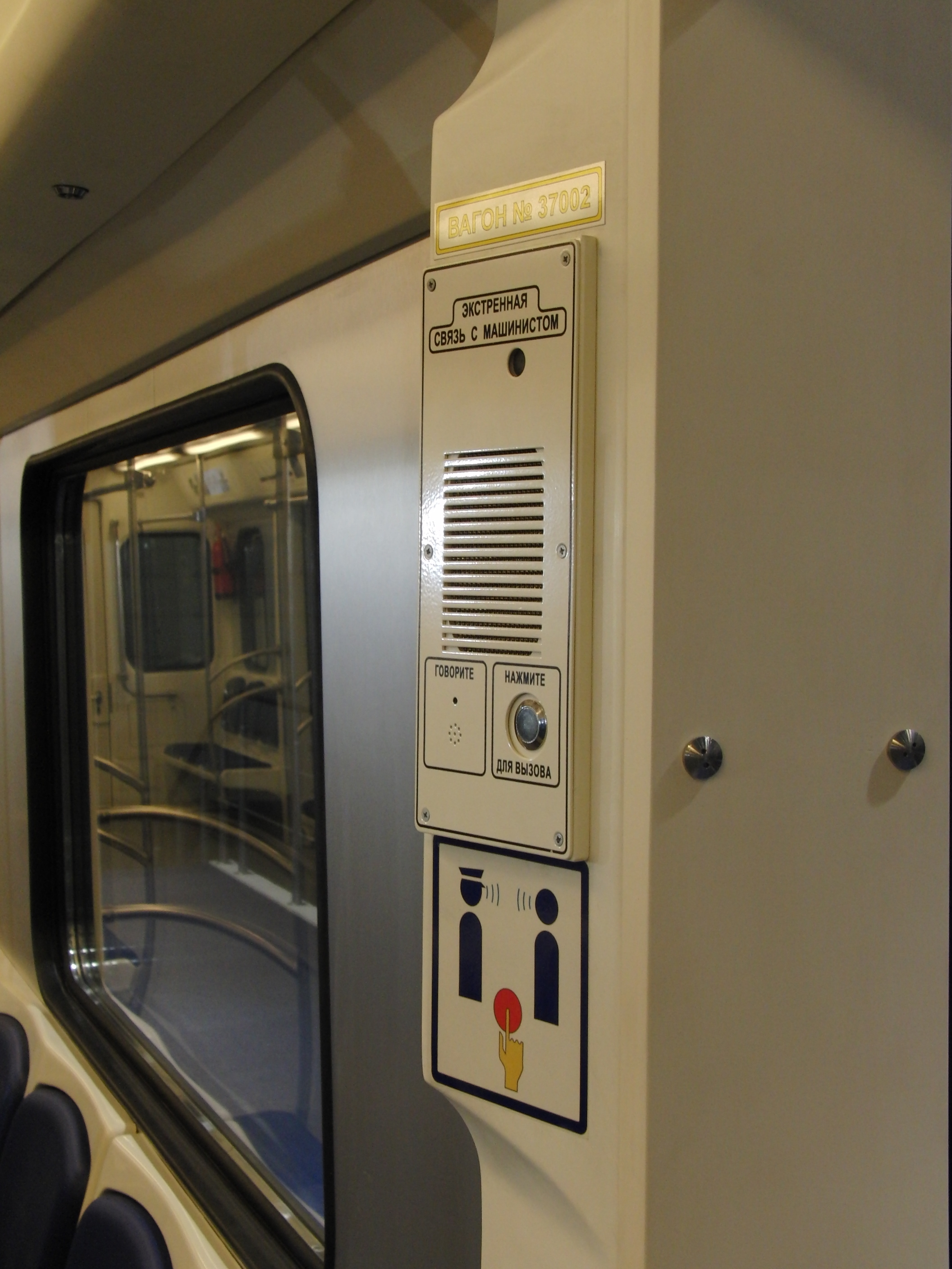 Вагон типа 81-760 на выставке «Экспосититранс 2010».